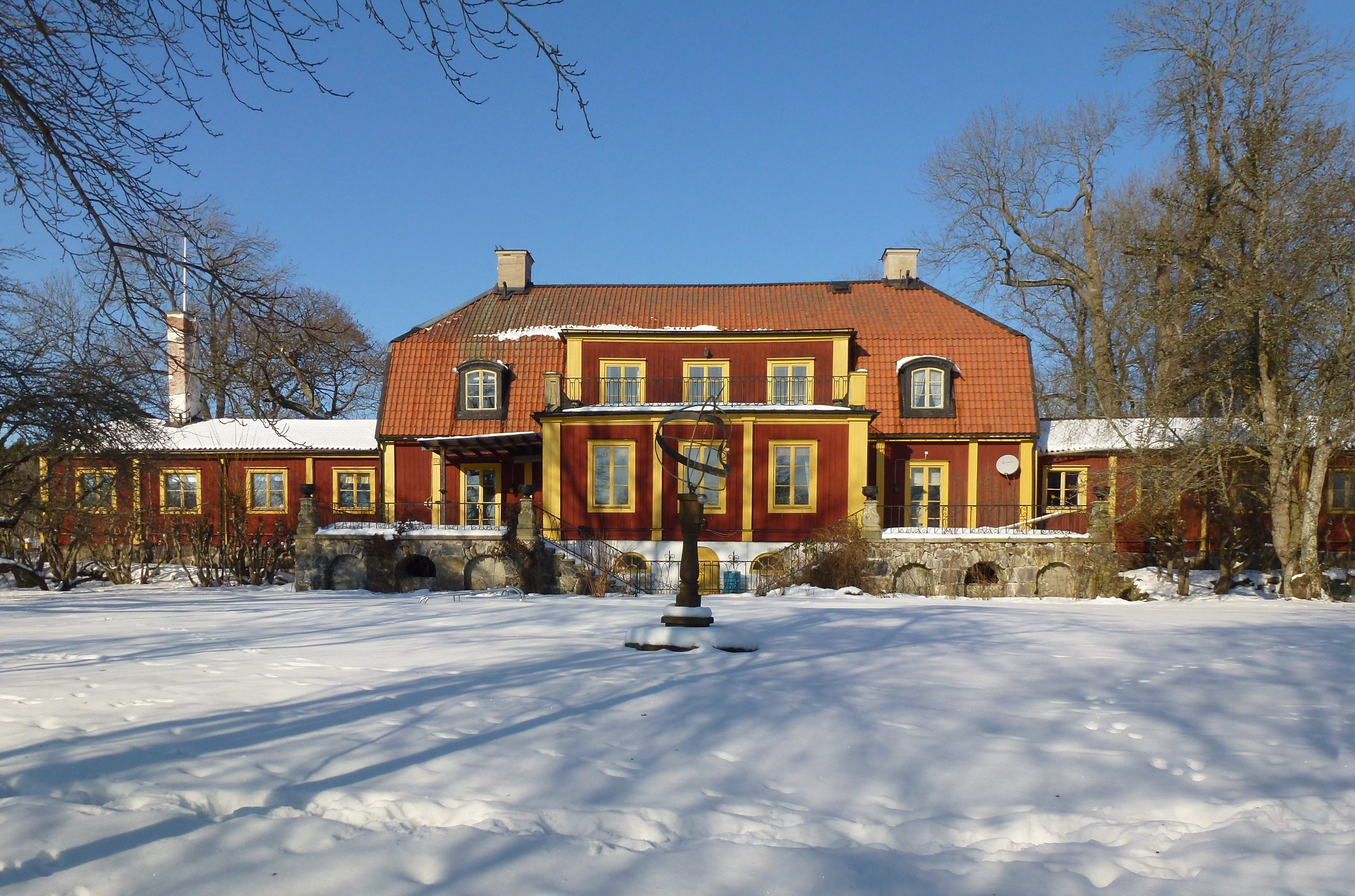 Elvesta gård, fasad mot syd